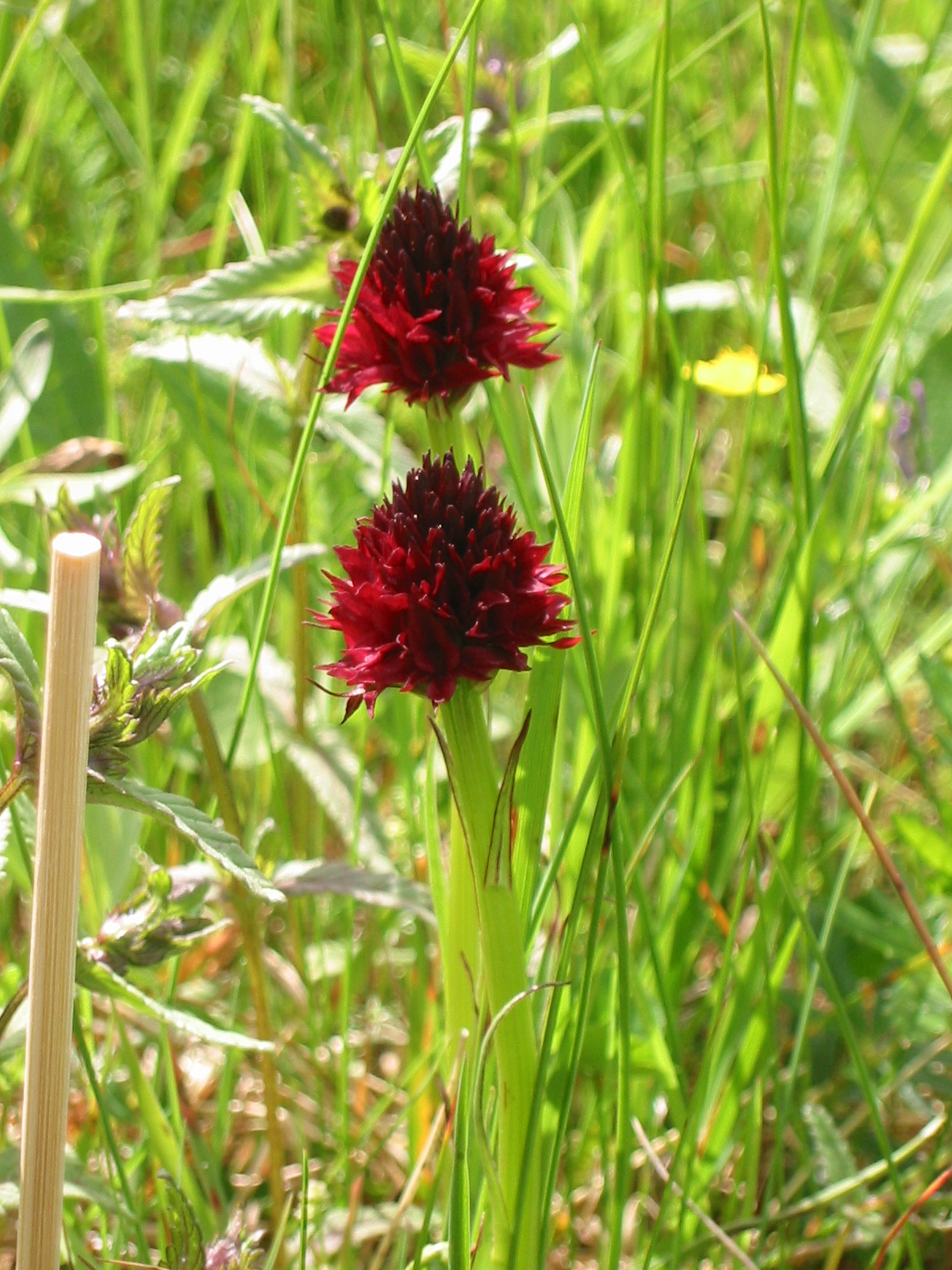 Nigritella nigra Sweden 2006